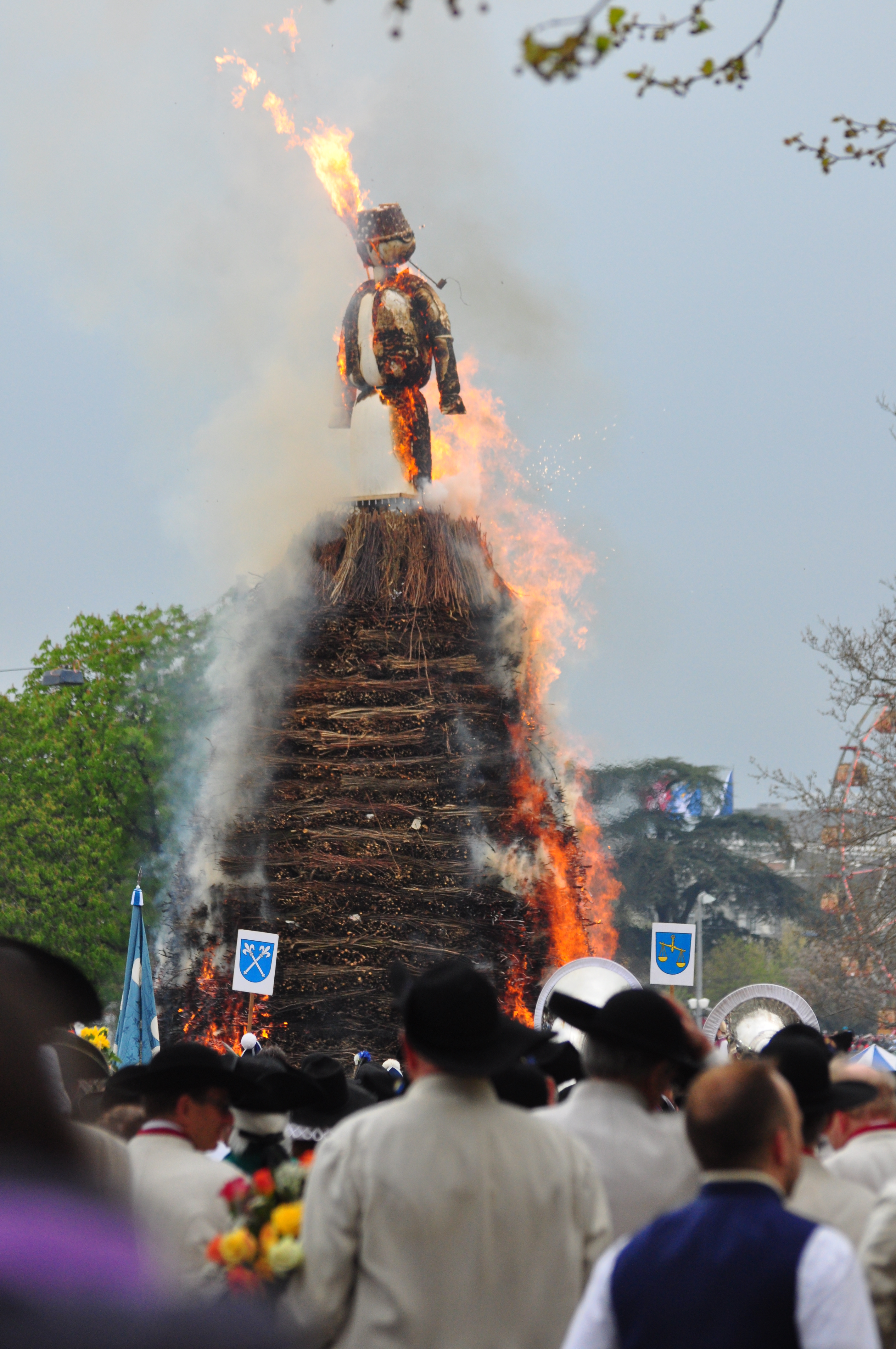 Sechseläuten in Zürich (Switzerland) : So-called ‹Böögg› burning on April 16, 2012, at Sechseläutenplatz (Bellevue)